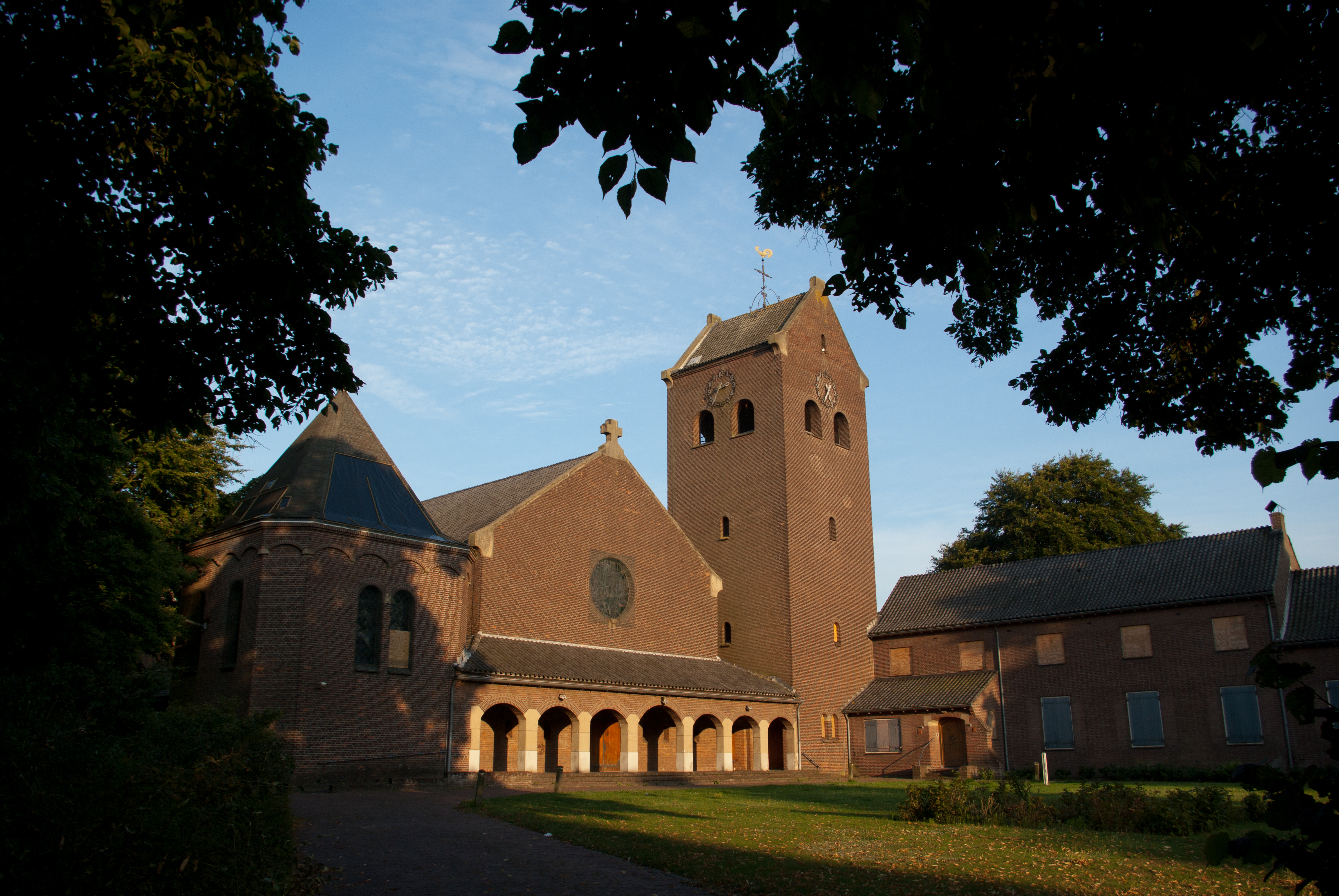 De voormalige Sint-Jozefkerk, waarvan de bestemming ongewis is.